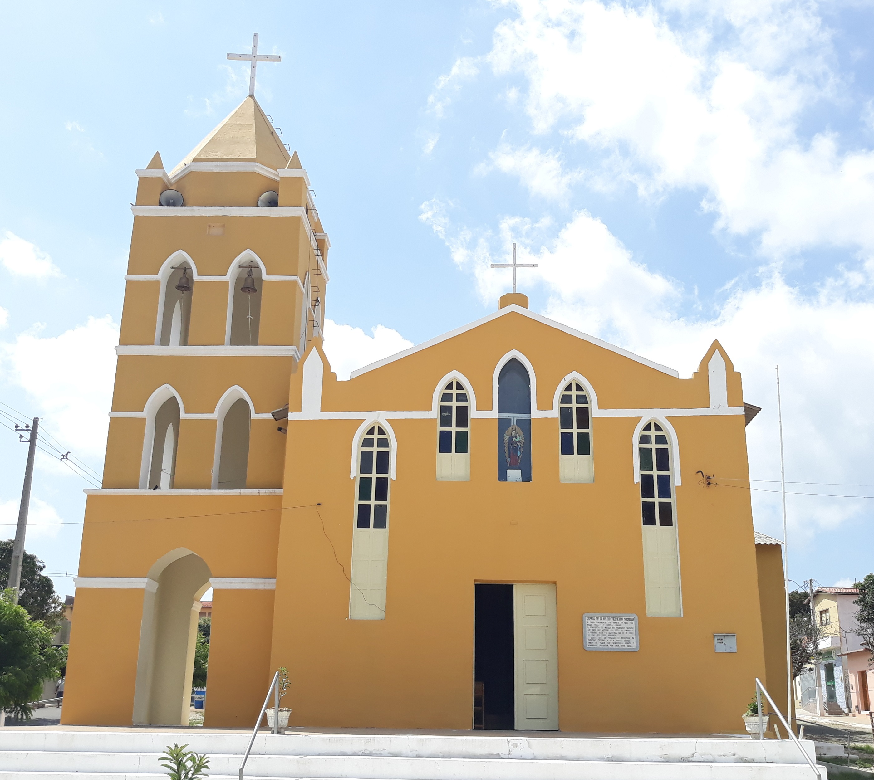 Capela de Nossa Senhora do Perpétuo Socorro, padroeira de Frutuoso Gomes, Rio Grande do Norte, Brasil